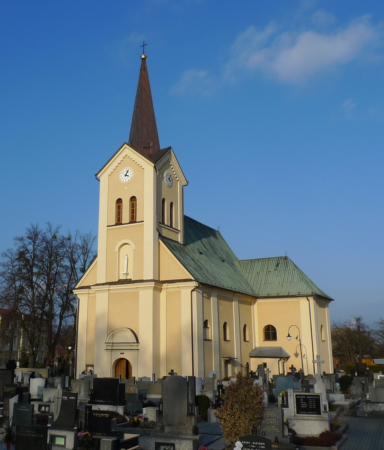 Kostel Nanebevzetí Panny Marie (Ostrava)